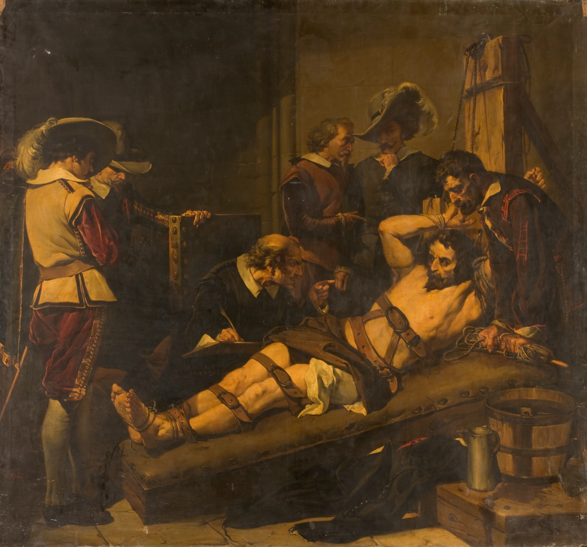 La obra representa al político y militar español Rodrigo Calderón (1576-1621), que fue marqués de Siete Iglesias y sería ejecutado en Madrid en 1621, en el tormento que sufrió antes de morir ahorcado en la Plaza Mayor de Madrid.